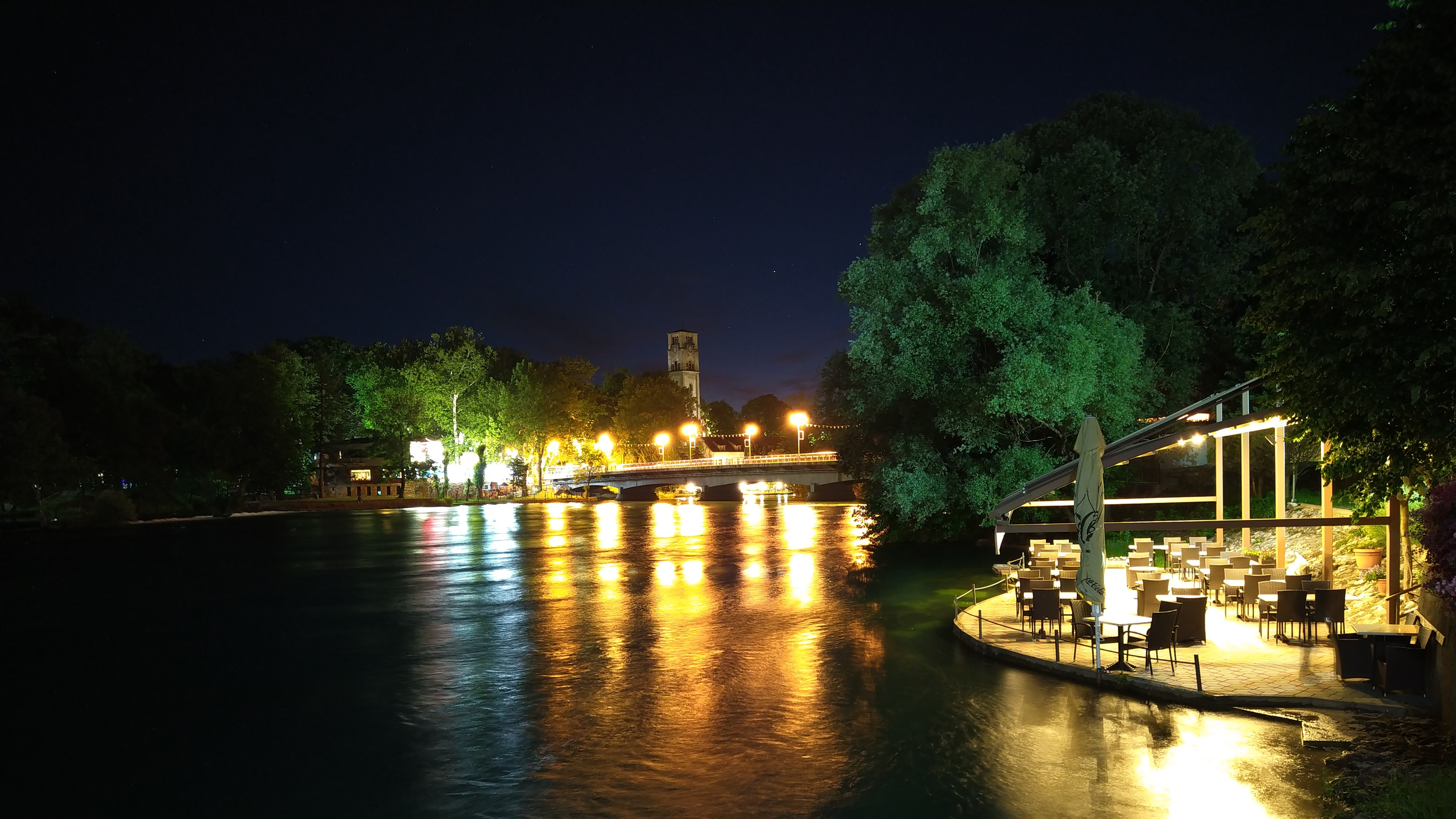 Grad Bihać slikan noću sa terase Intima Bar kafića u ulici Džemala Bijedića.